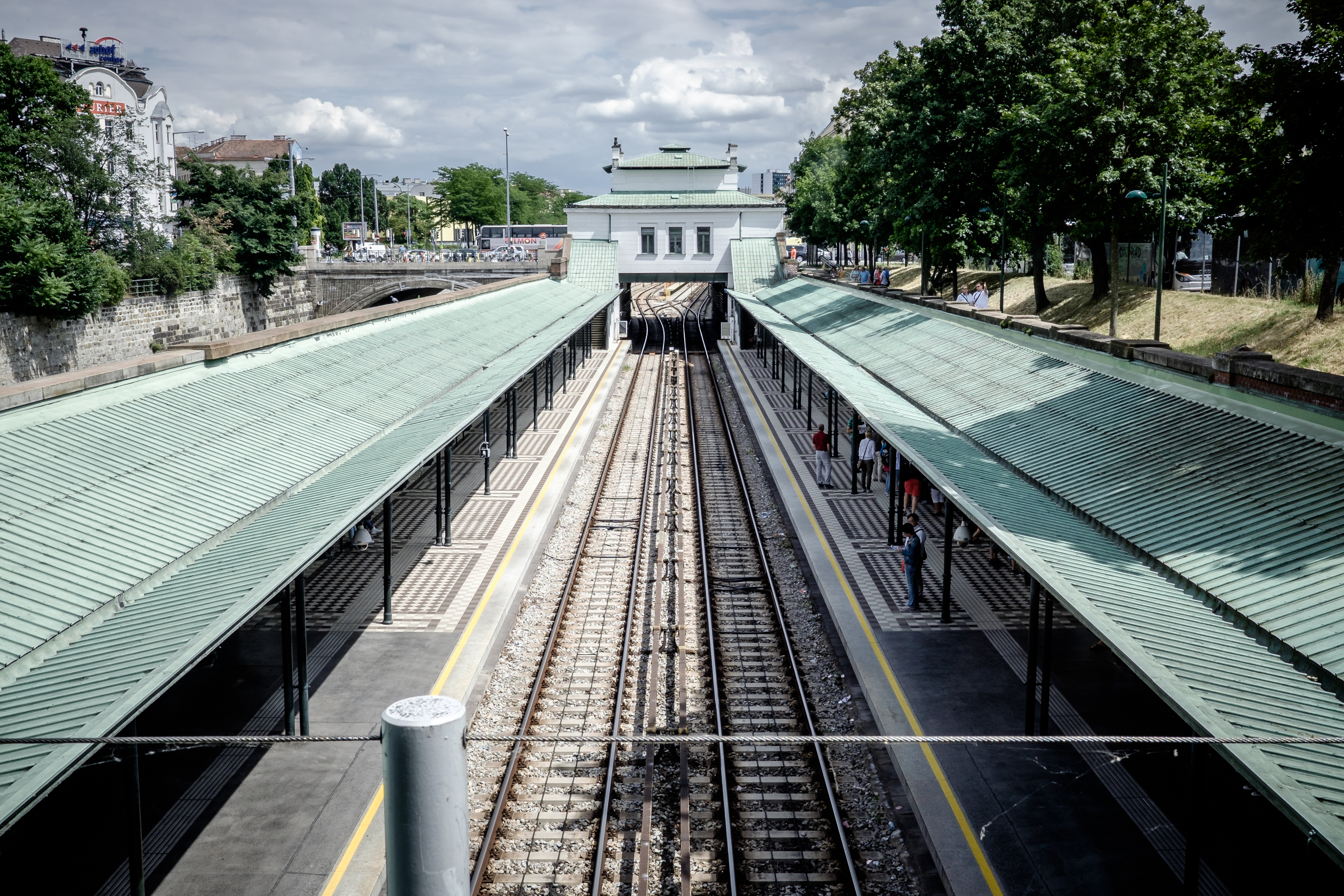 Vienna